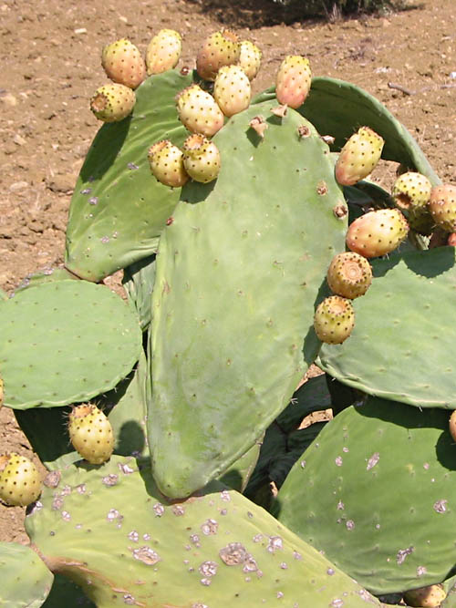 Kaktufeige // selbst fotografiert // Public Domain)